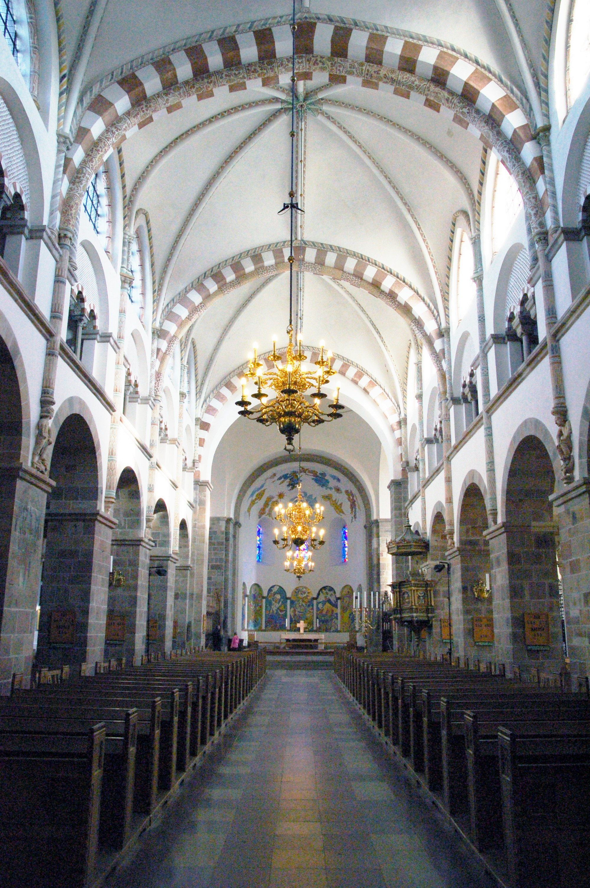 Ribe, Denmark